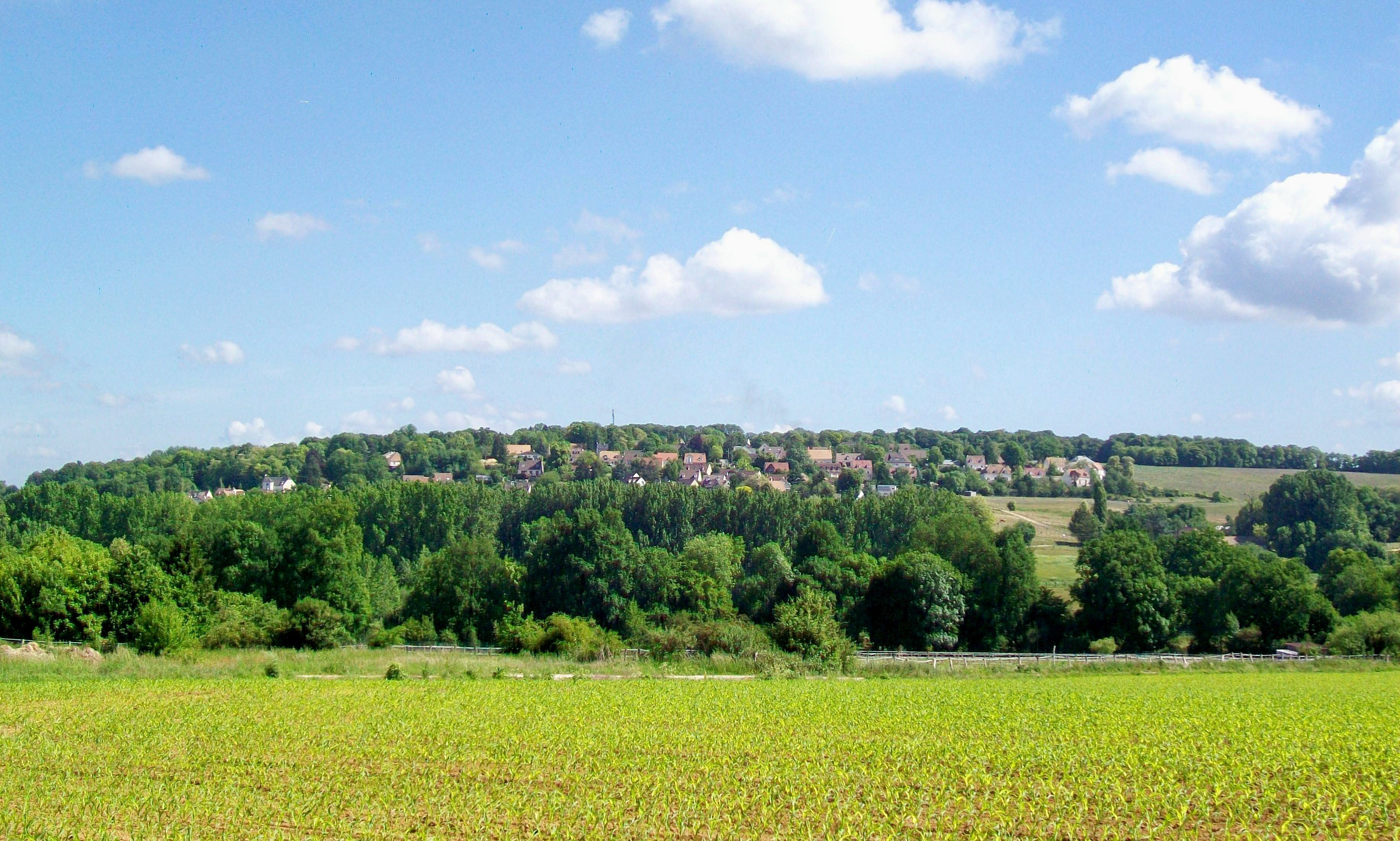 Vue sur le quartier des Coteaux depuis le chemin rural dit de la Paroisse, en venant de l'église de Luzarches. L'on constate que le mot mont paraît à juste titre dans le nom de la commune, mais qu'il n'est plus chauve. La photo est prise depuis une altitude de 60 m environ, et le point culminant du village est à 116 m (122 m dans la forêt).